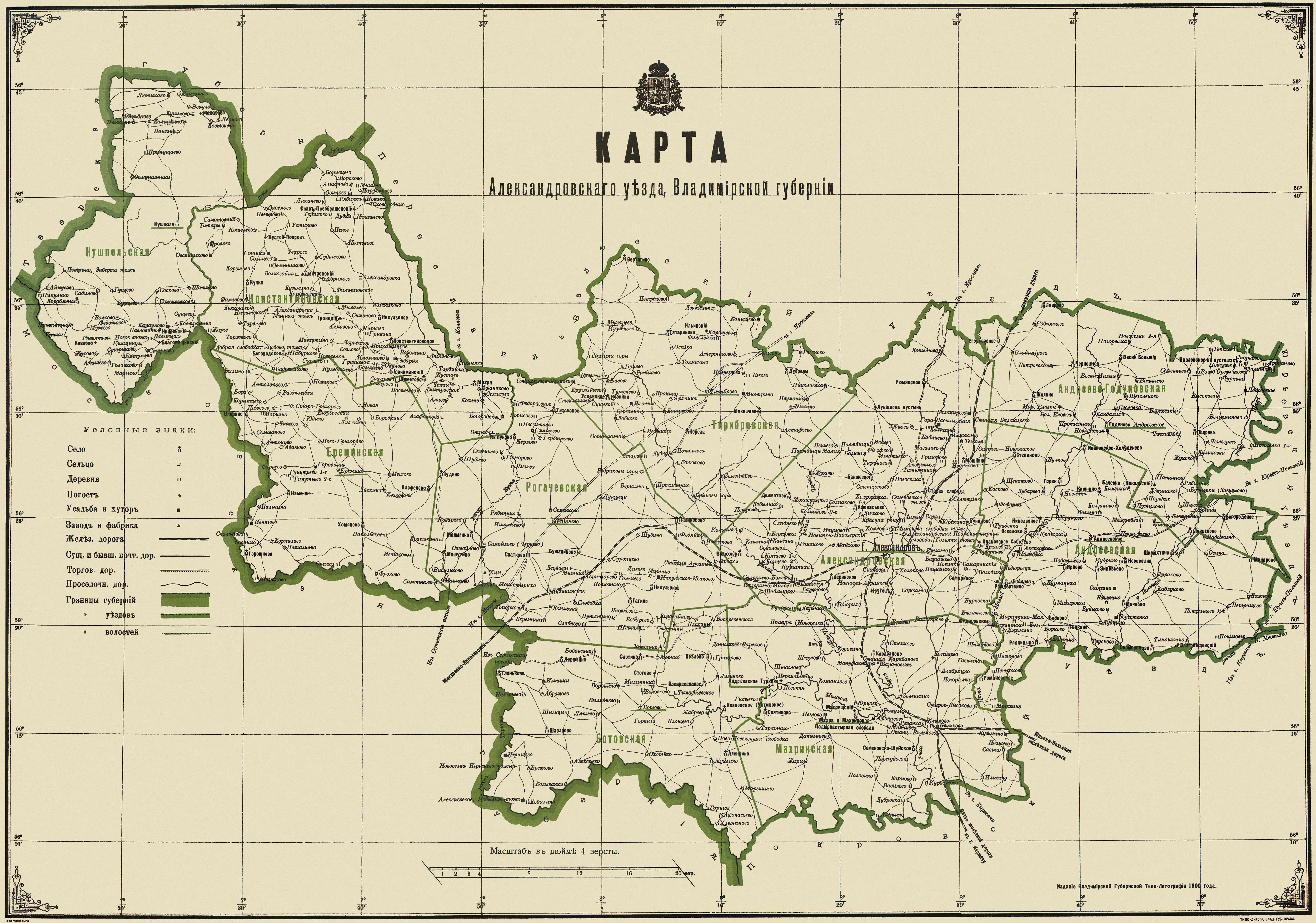 Карта Александровского уезда 1900 года